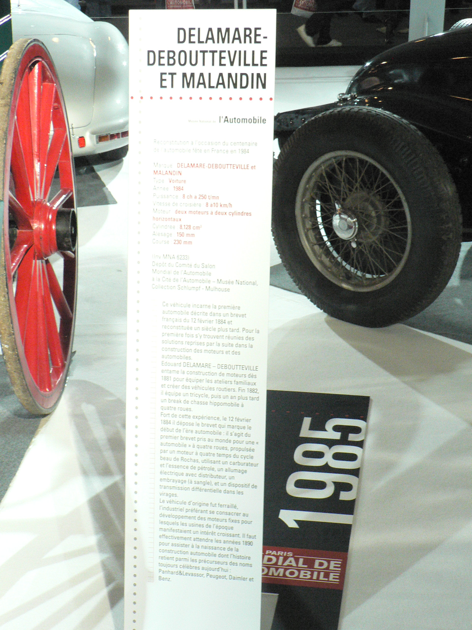 Mondial de l automobile de Paris (October 2006)